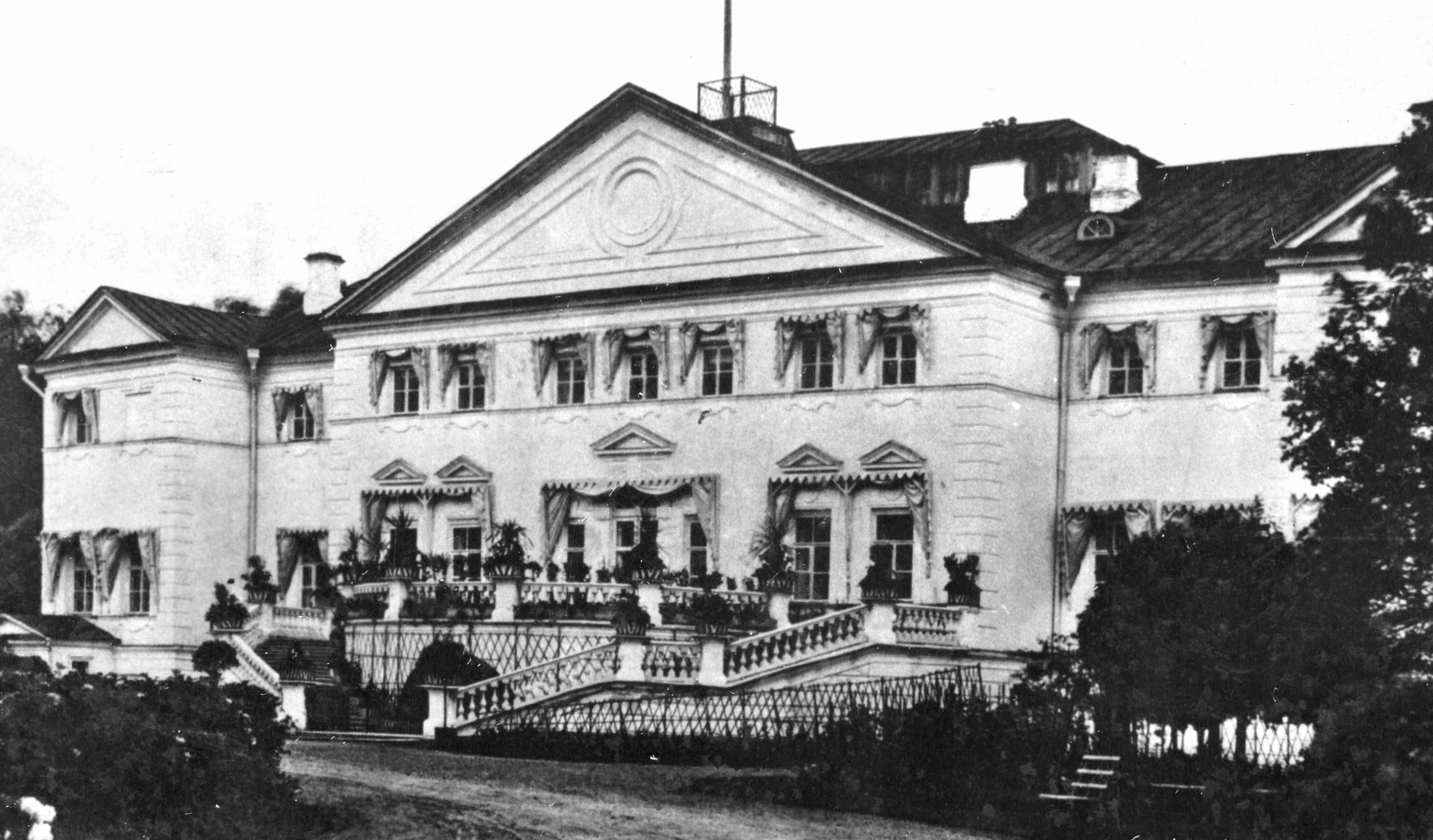 Olgovo Palace